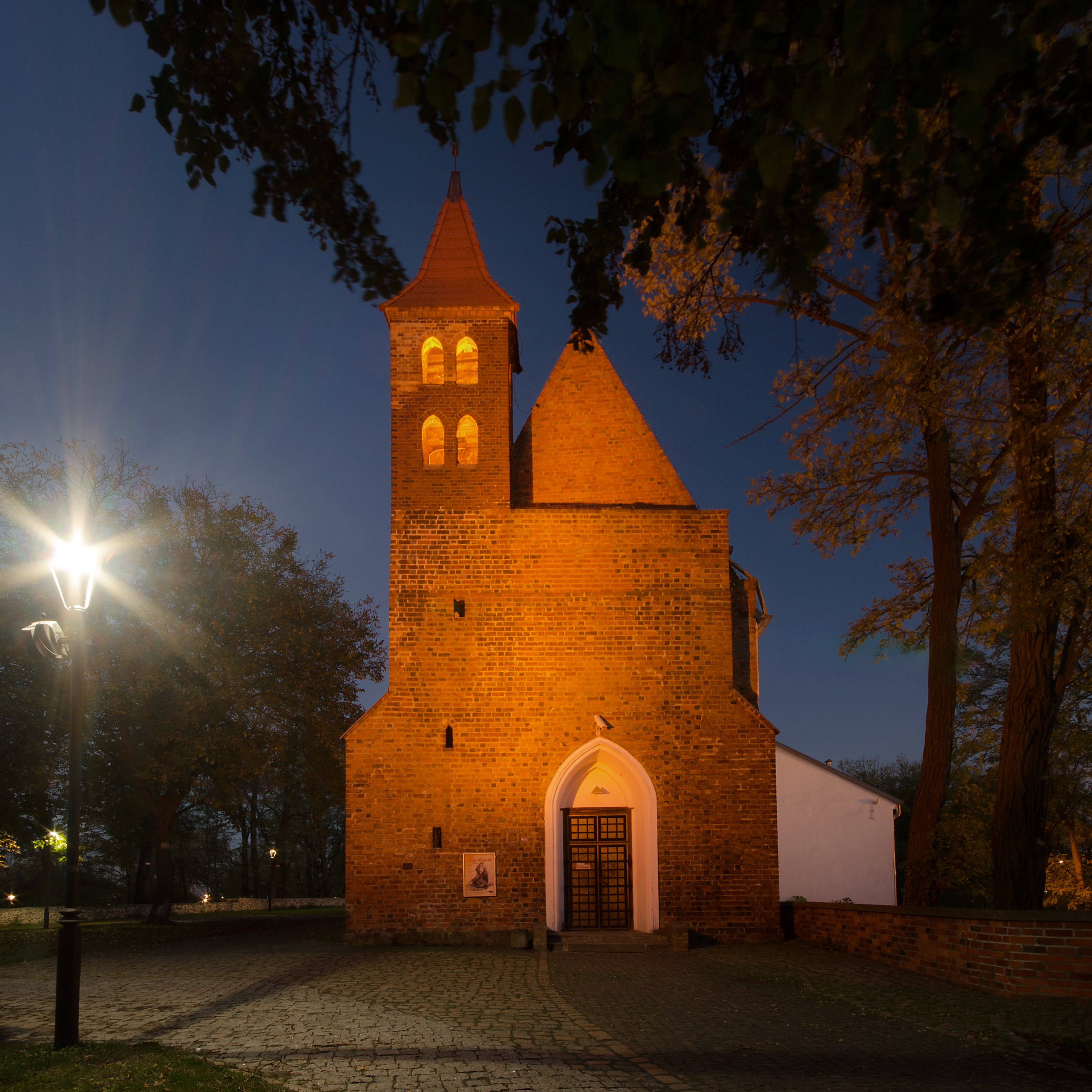 Lubin, kaplica zamkowa św. Jadwigi, ob. galeria sztuki, XIV, XVIII, XIX